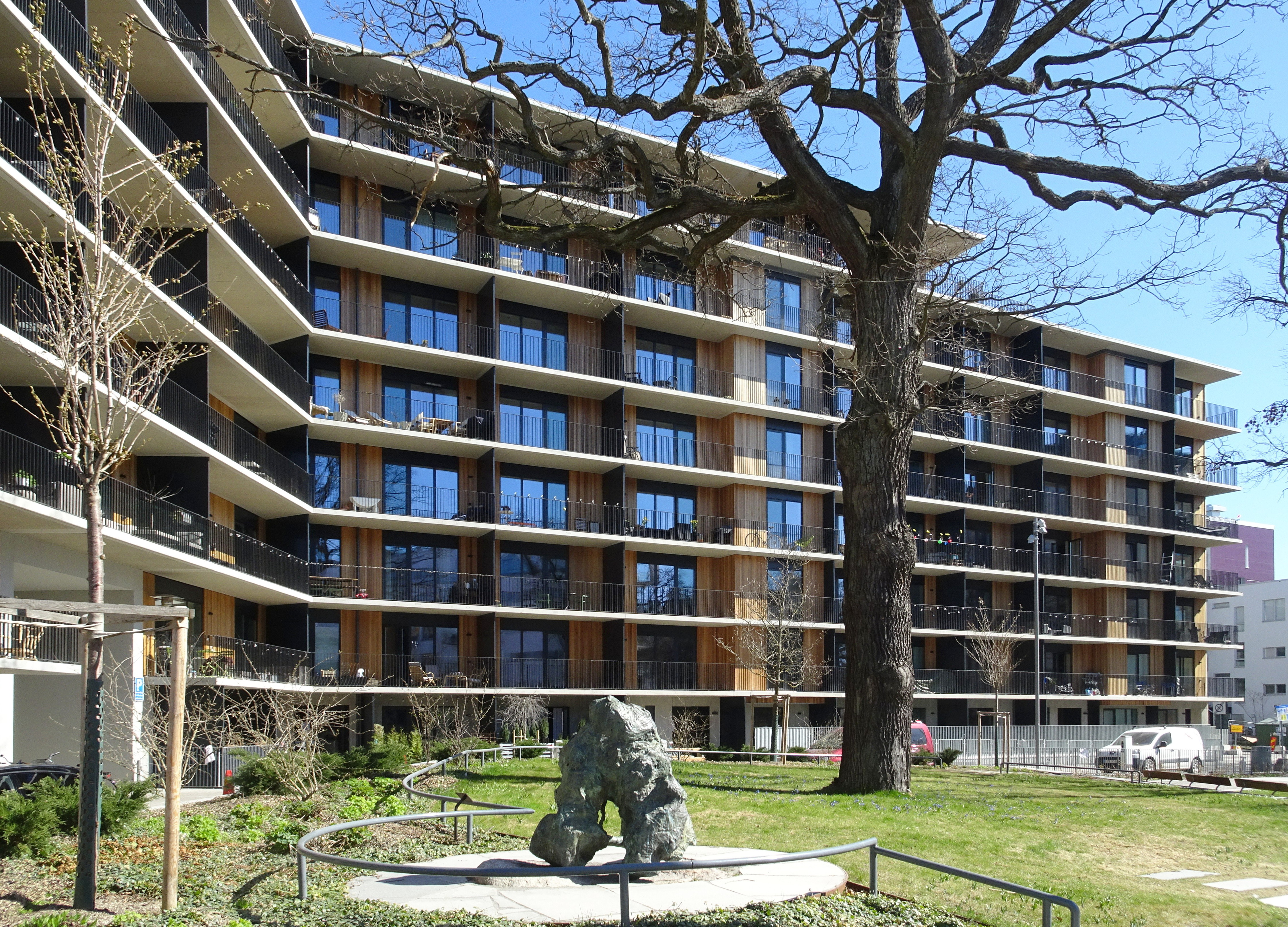 Gröndal Strand, Seglarparken, kvarteret Storsegeln